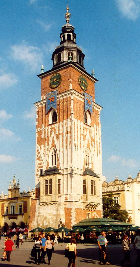 Krakow ratusz